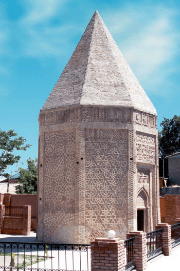 Yusuf ibn Kuseir mausoleum in Nakhichevan